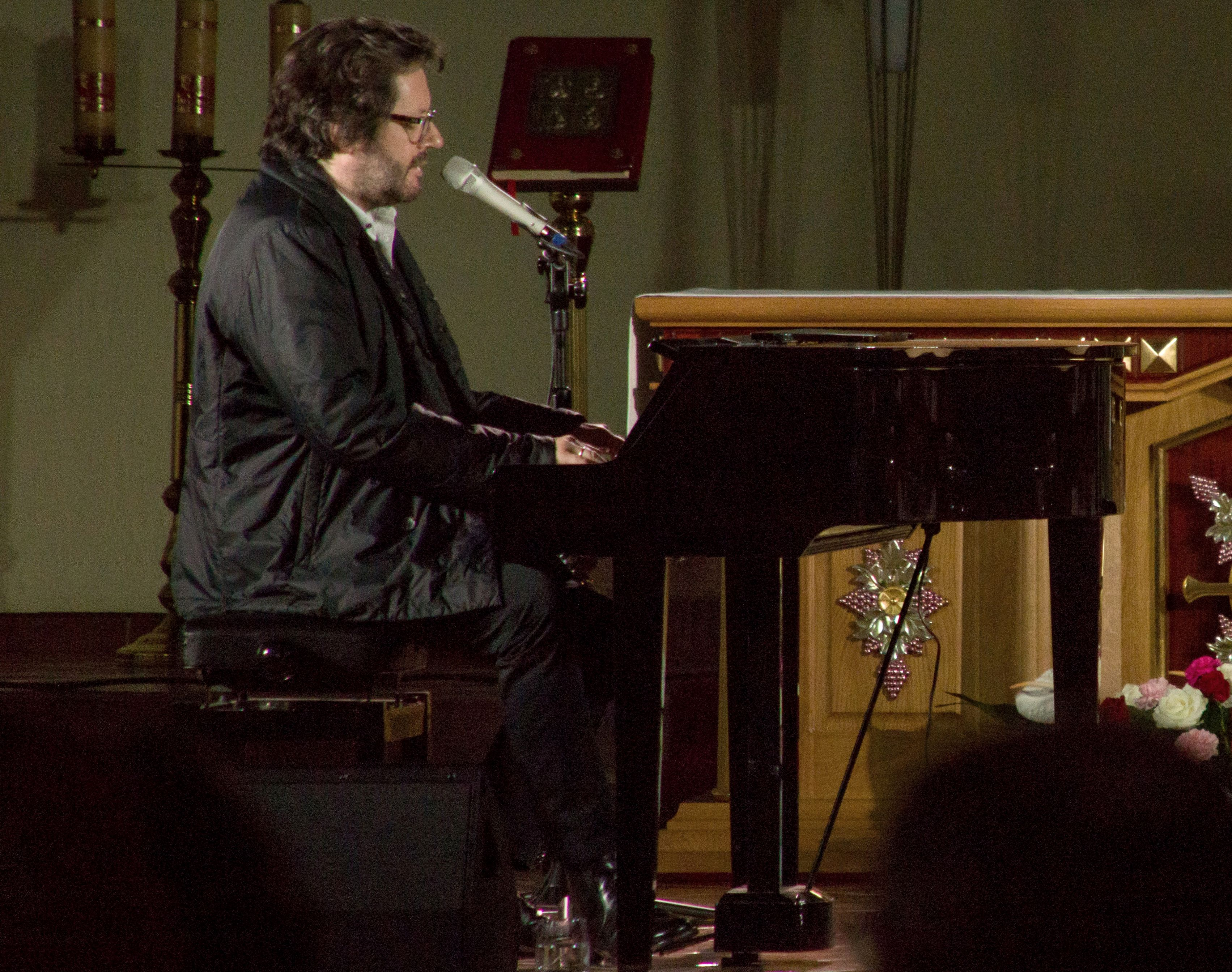 Grzegorz Turnau koncert Żary. lubuskie